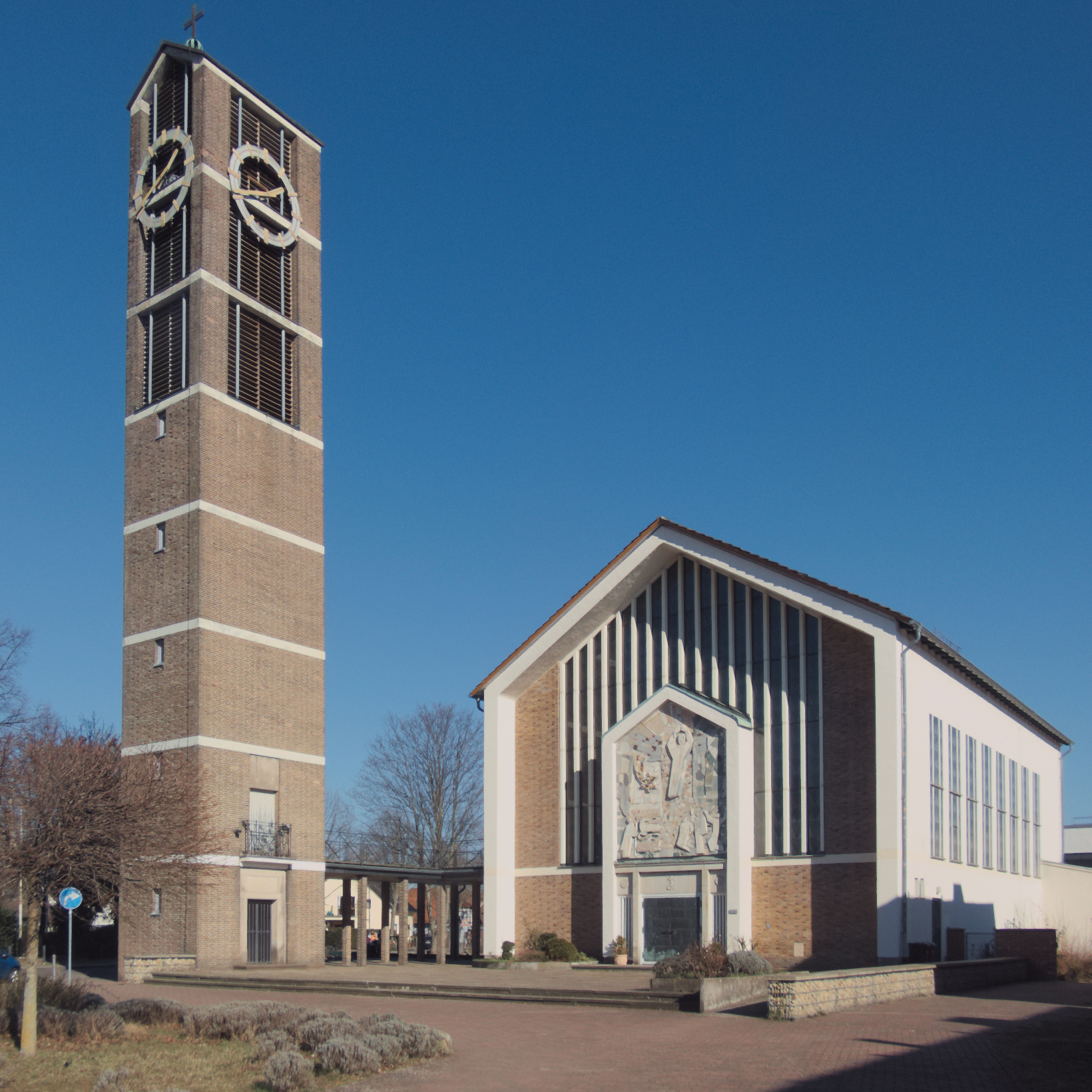 Die Kirche St. Michael im Seelzer Stadtteil Letter.